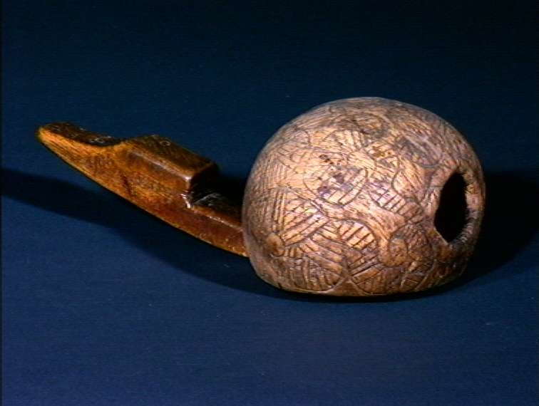 Busleik skåret i bjørk med innskrift: MGD 1863, fra Lom i Oppland. lengde 22 cm. Foto Anne-Lise Reinsfelt / Norsk Folkemuseum.